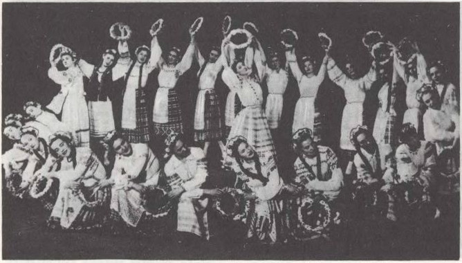 Сцэна з балета «Князь-возера» В.Залатарова. 1949.